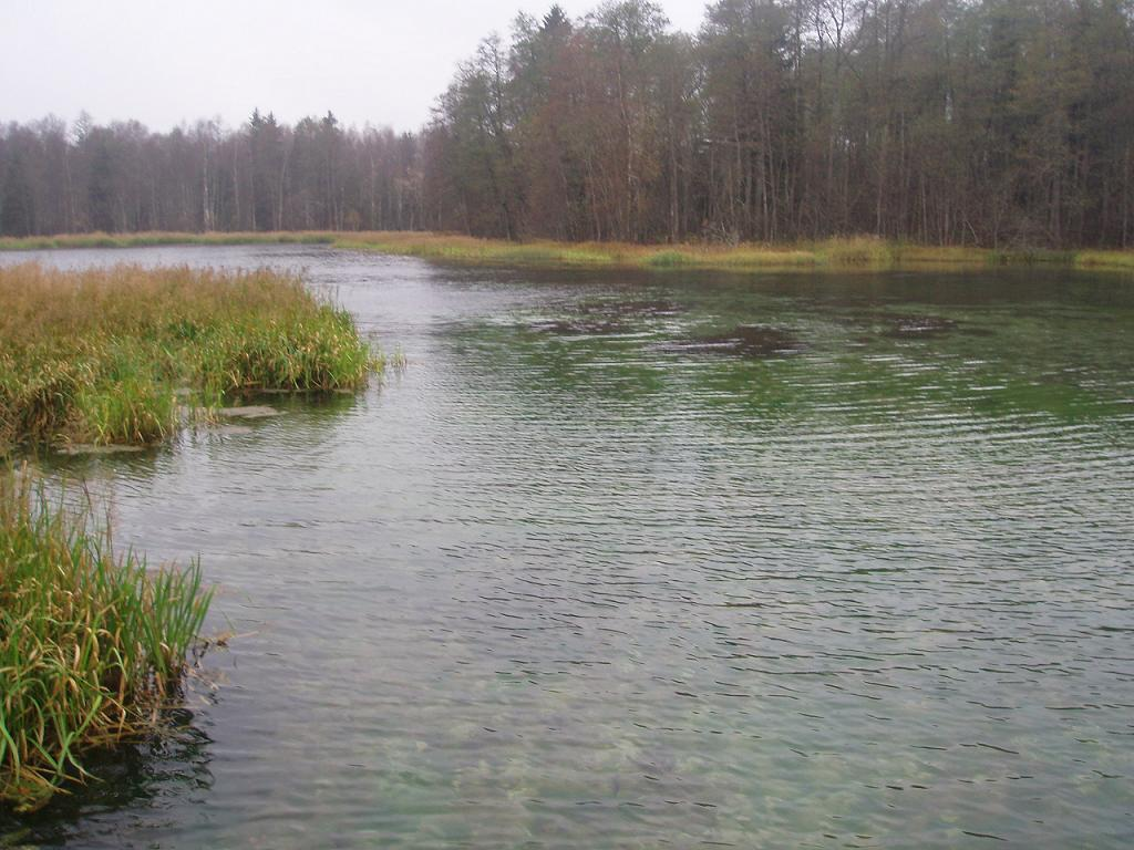 Prandi allikajärv.